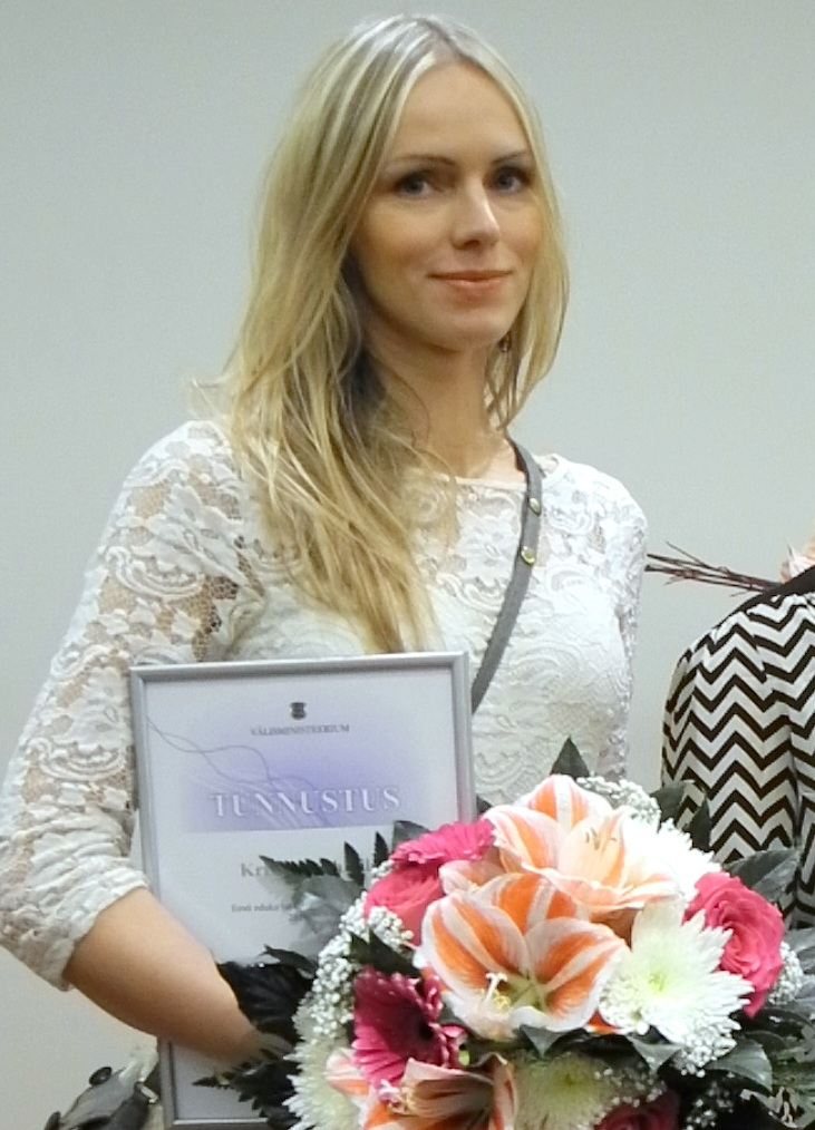 Kristiina Ehin, eesti luuletaja